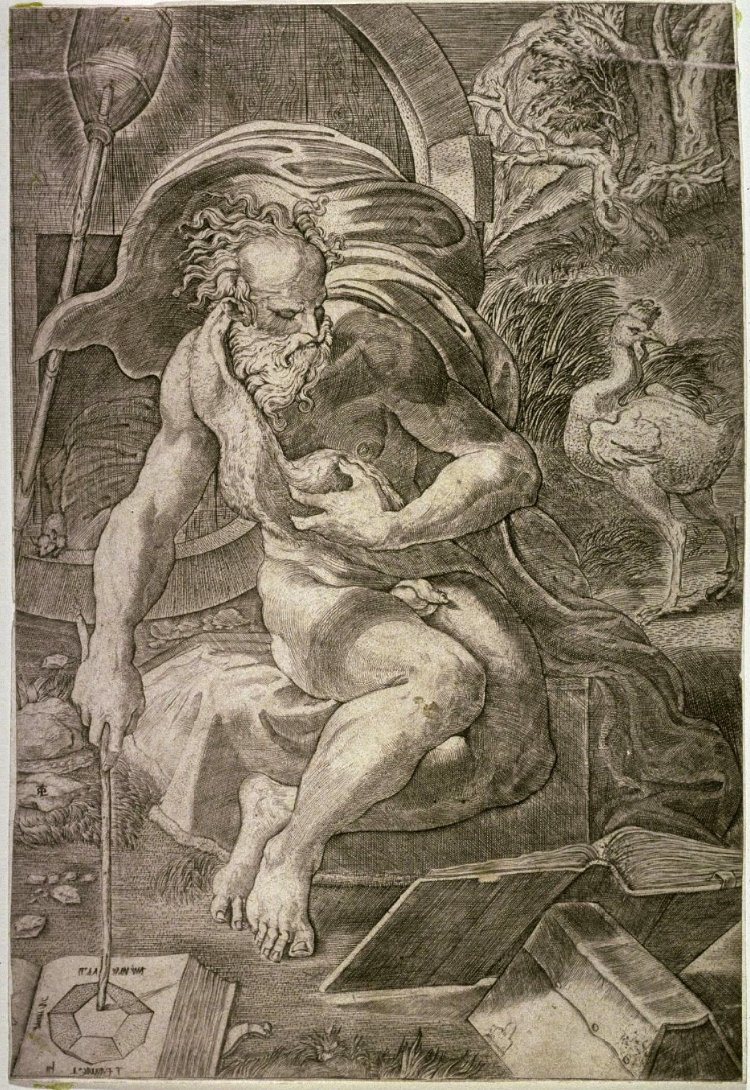 Diogenes. Engraving.